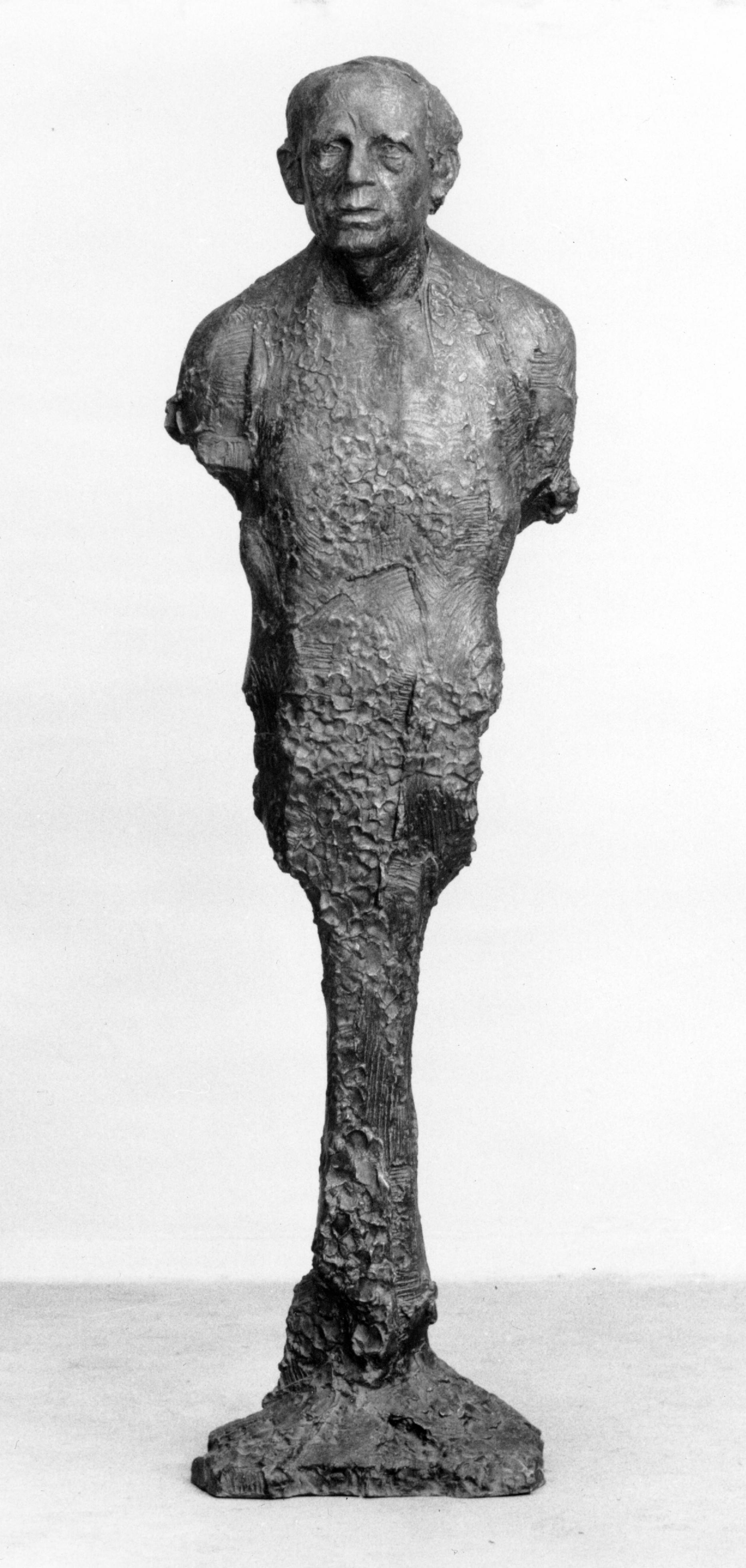 Bronze, Höhe 194cm